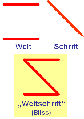 Beispiele einer Pasigrafie, die Semantographie (Blisssymbole) von Charles K. Bliss